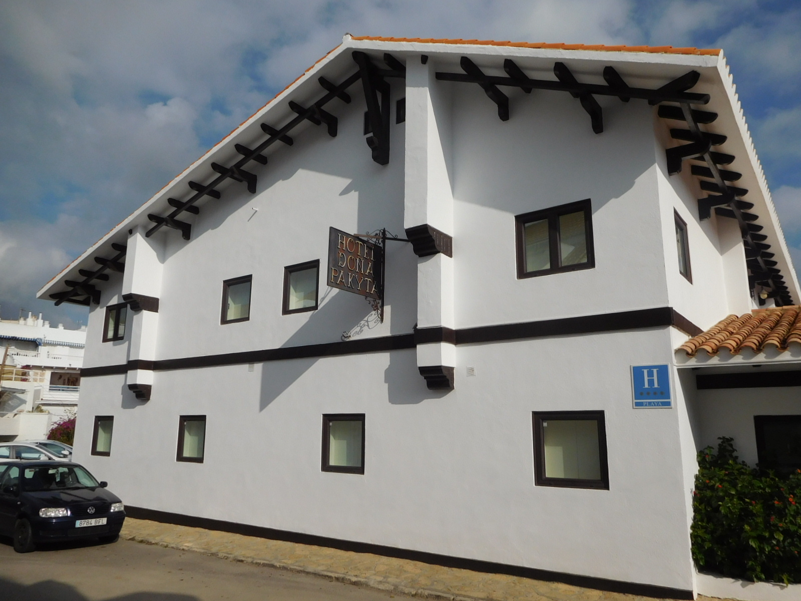 Fotografía del hotel Doña Pakyta en San José, municipio de Níjar, provincia de Almería, Andalucía, España.